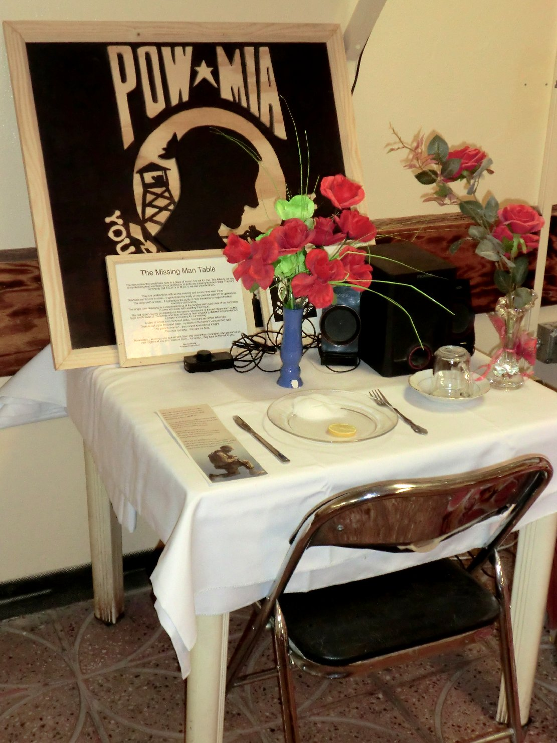 Foto eines Missing Man Tables im Camp Spann, Afghanistan